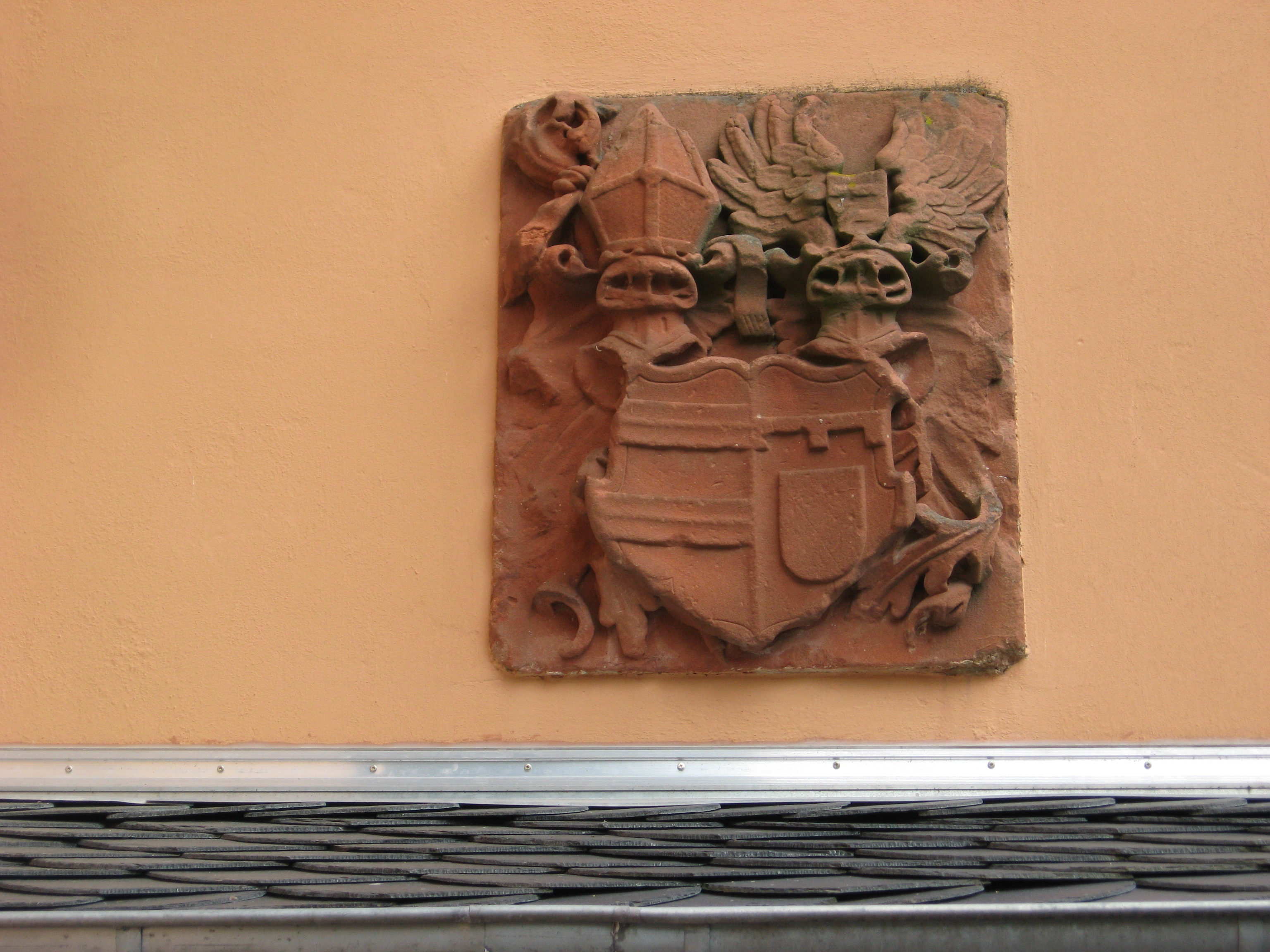 Wappenrelief aus Sandstein im Kloster Springiersbach, Wappen des Abtes Johann Everhard von Deusternau (1621-1638) nach: Karl-Josef Gilles und Erwin Schaaf: Springiersbach. Von der Augustiner-Chorherrenabtei zum Karmelitenkloster 1102−2002. Hrsgg. von der Verbandsgemeinde Kröv-Bausendorf und dem Karmelitenkloster Springiersbach (Schriftenreihe Ortschroniken des Trierer Landes, Band 36), Trier 2002, S. 401